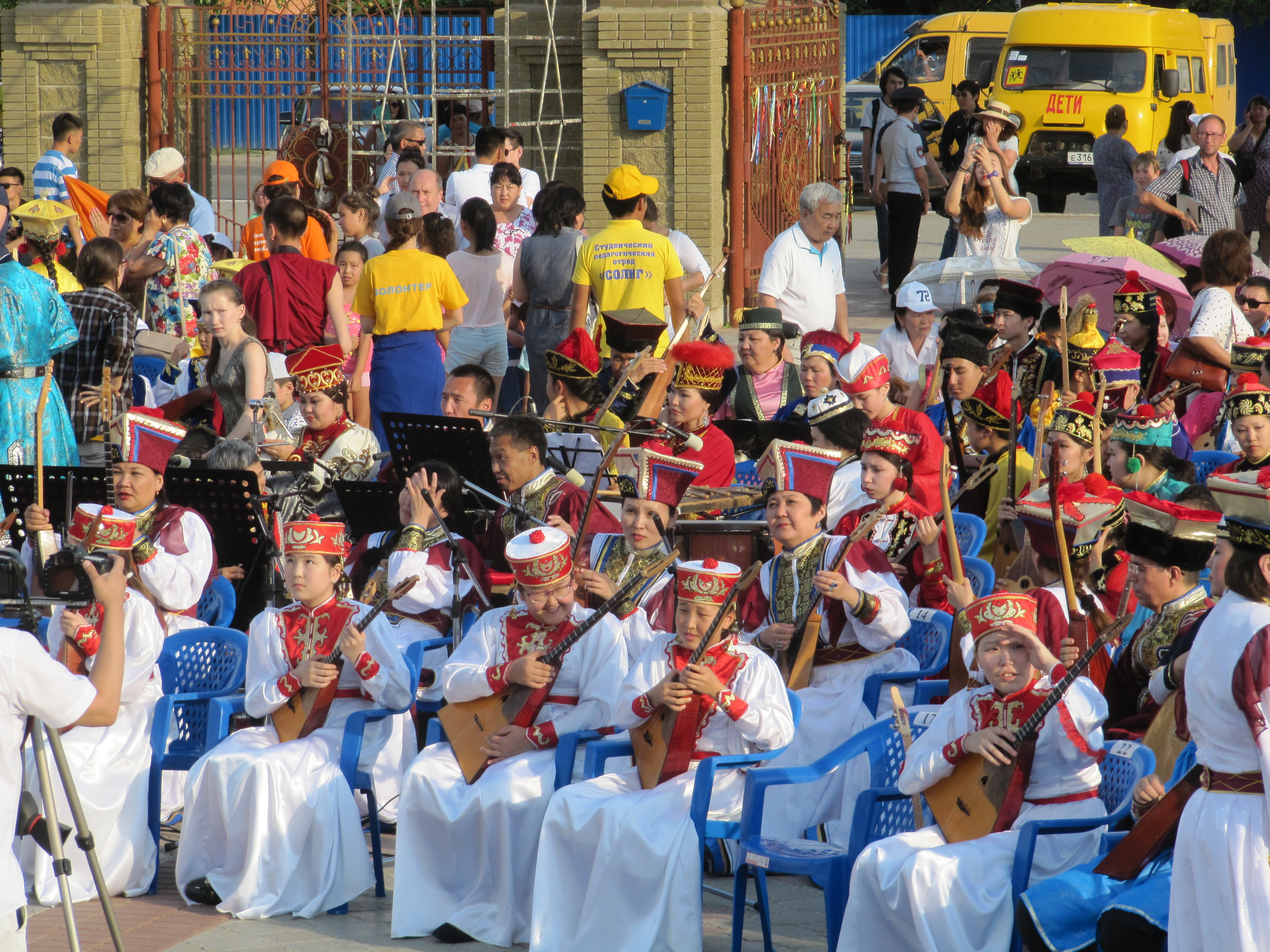 Домбристы во время концерта сводного оркестра домбристов, Элиста, 14.06.2015